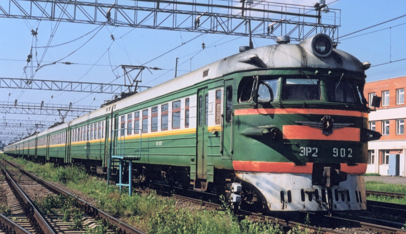 Электропоезд ЭР2-902